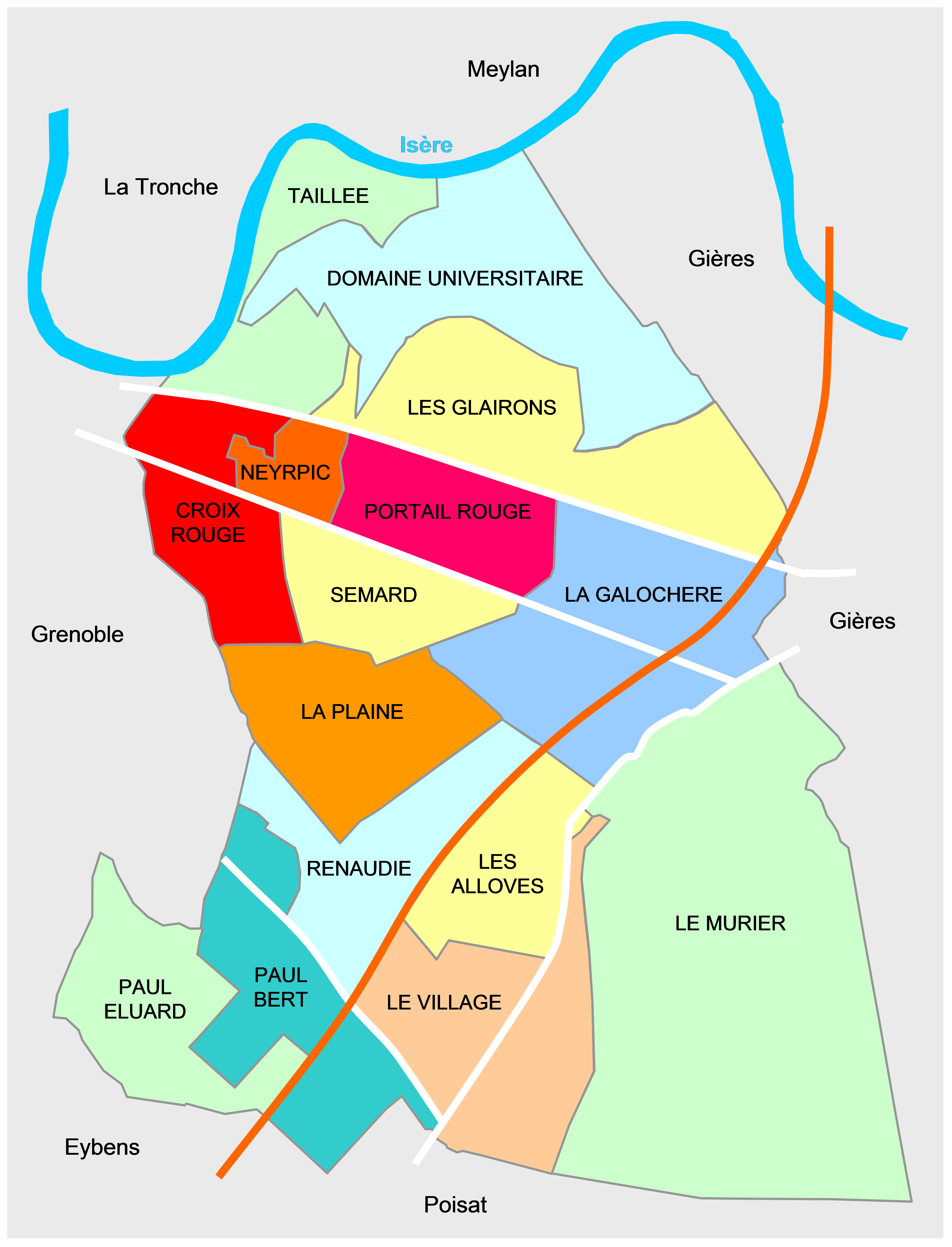 Carte des quartiers de Saint Martin d'Heres basée sur le découpage INSEE IRIS 2000 (Variante : GALOCHERE séparé de MURIER).